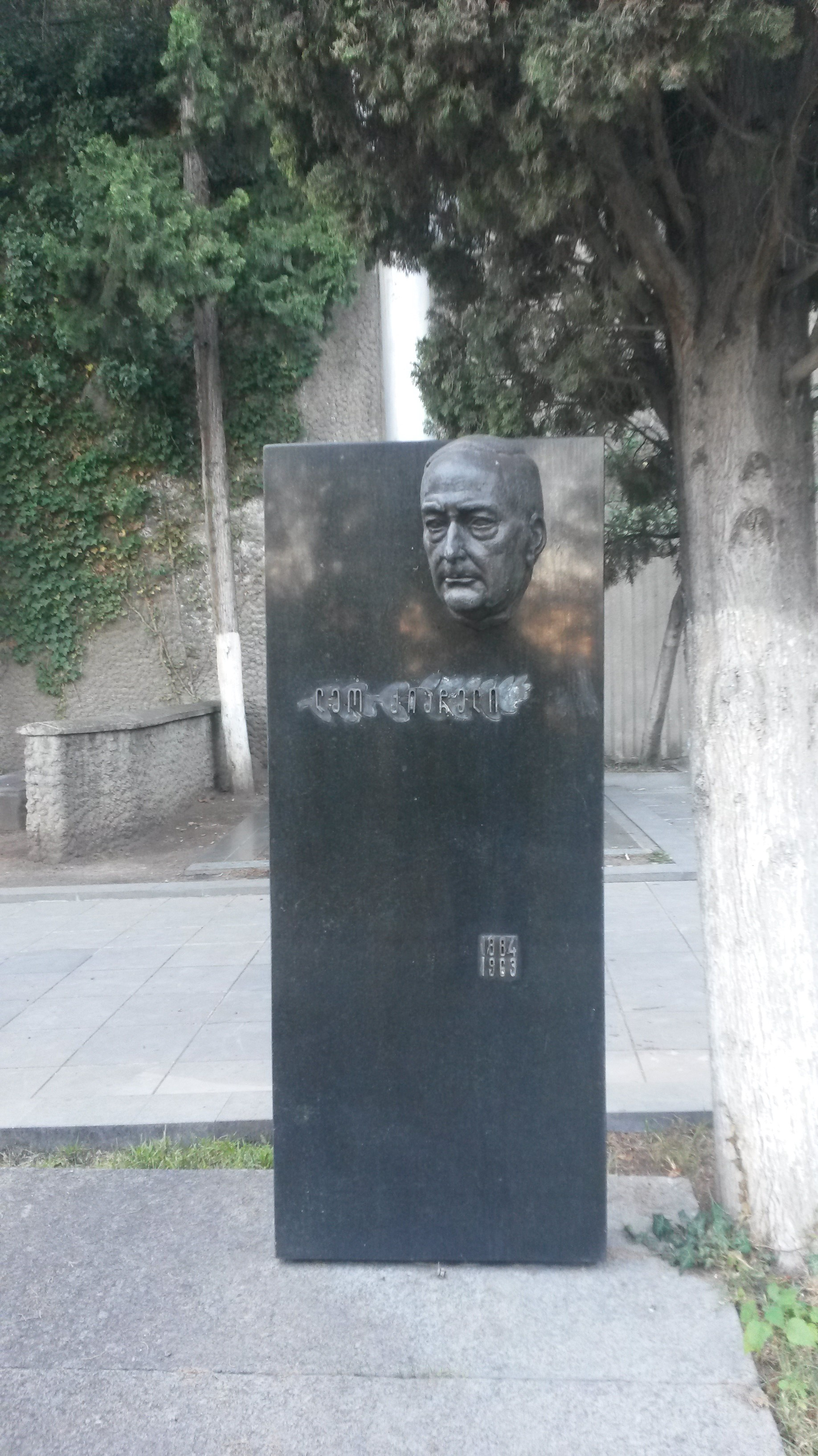 მთაწმინდის პანთეონი